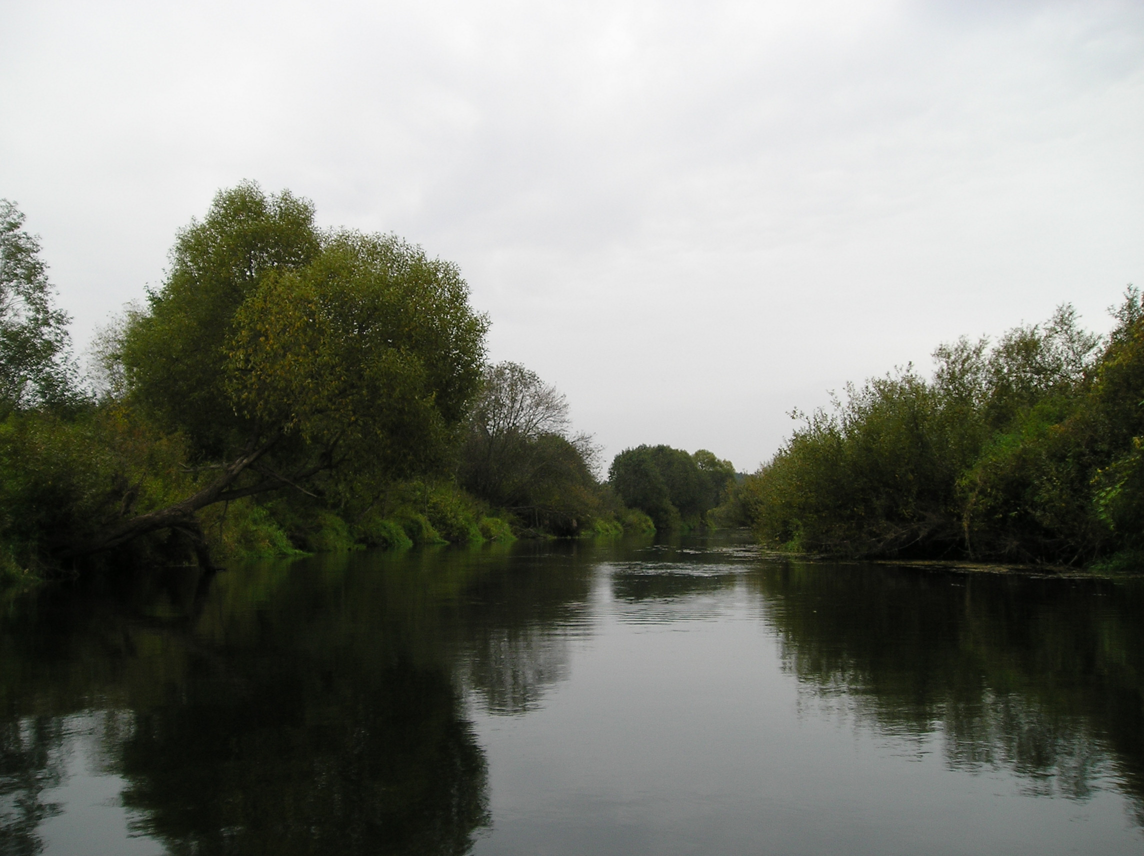 Река вихра. В районе Деревни шелеговка.